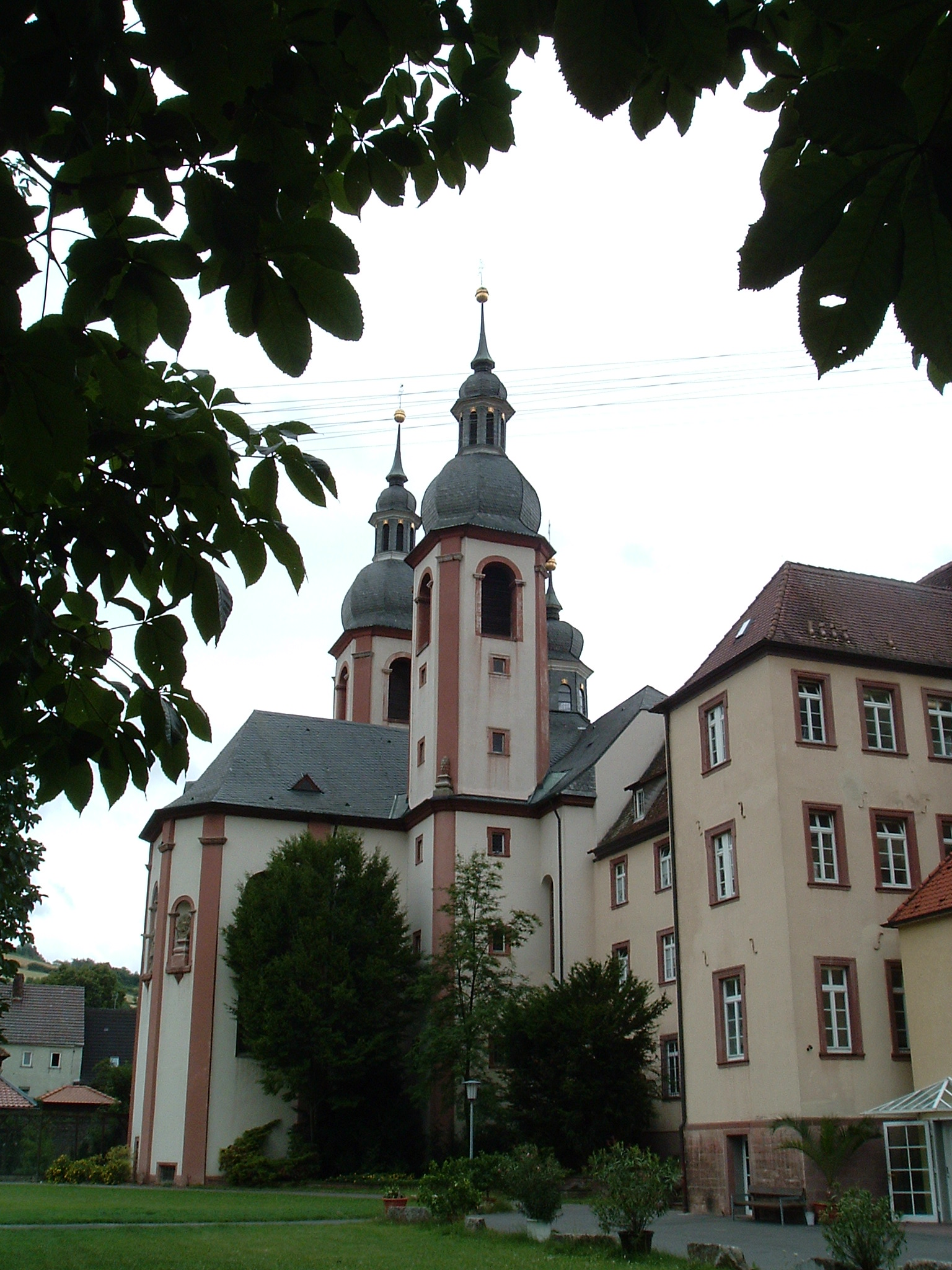 Photo personnelle - juillet 2004